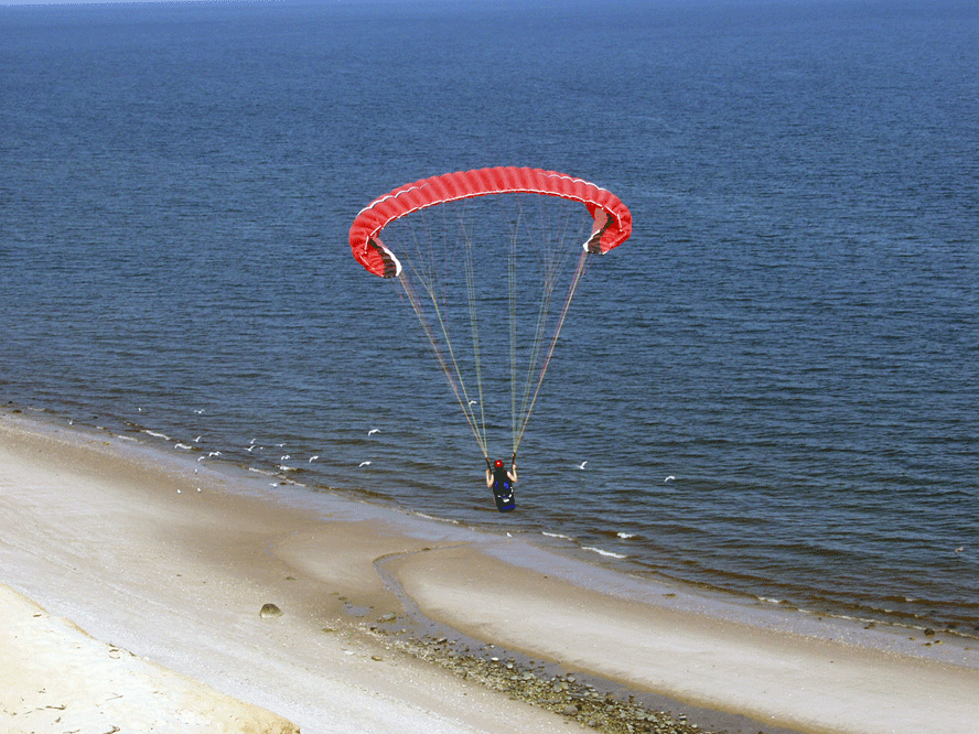 Парапланер над Сопот. Кръг от PWC 2005; © 2005 Асен Баръмов (